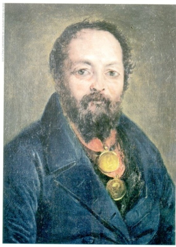 Александр Логинович Торлецкий 1830 - 1840-е гг. Портрет А. Л. Торлецкого 1776-1857. Этюд. 19, 5 X 14,5. ГИМ. Портрет М. М. Сперанского. 1839. Вероятно, повторение утраченного портрета 1824 г. 100 X 80. Куйбышевский городской художественный музей. Василий Андреевич Тропинин